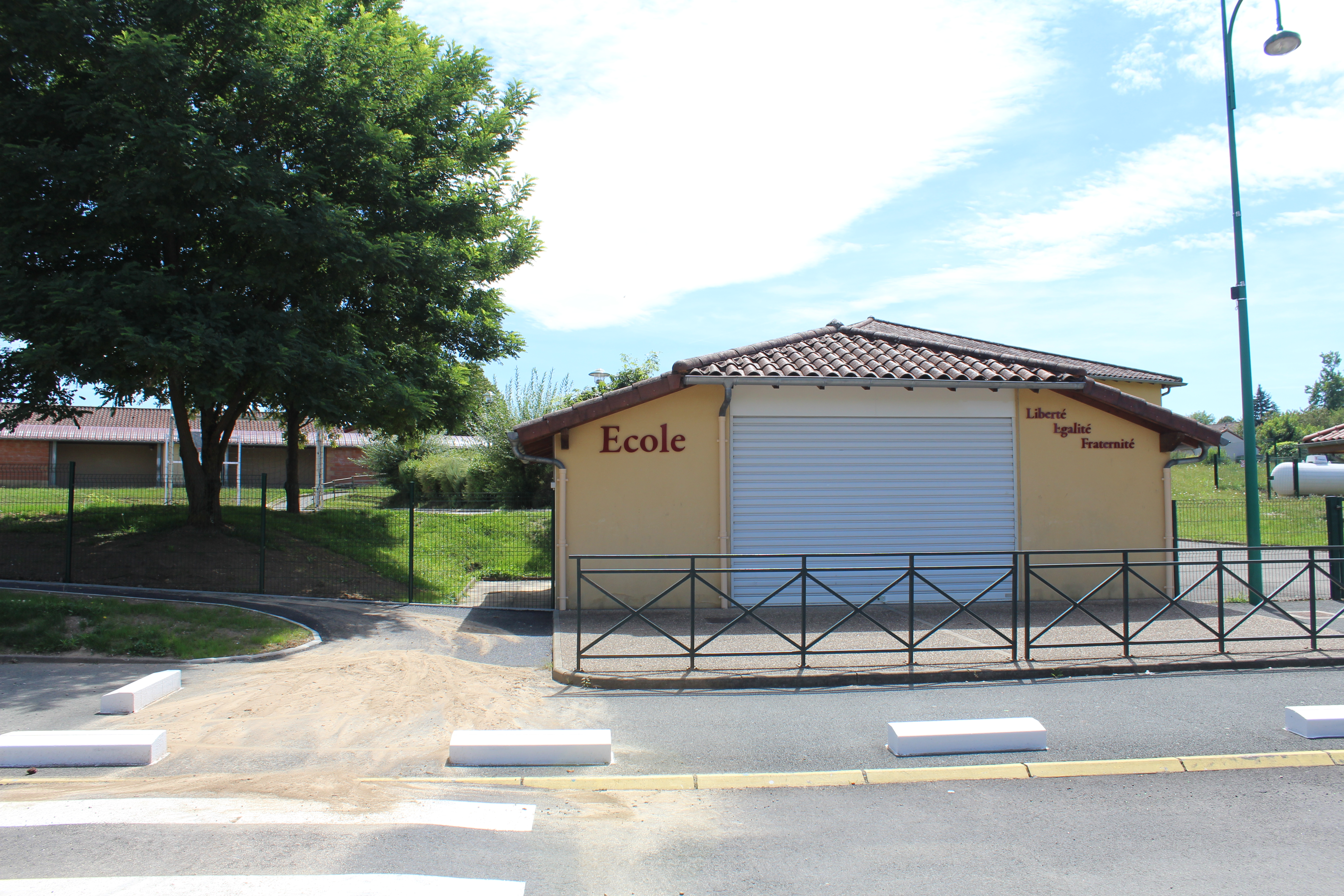 École de Laiz.